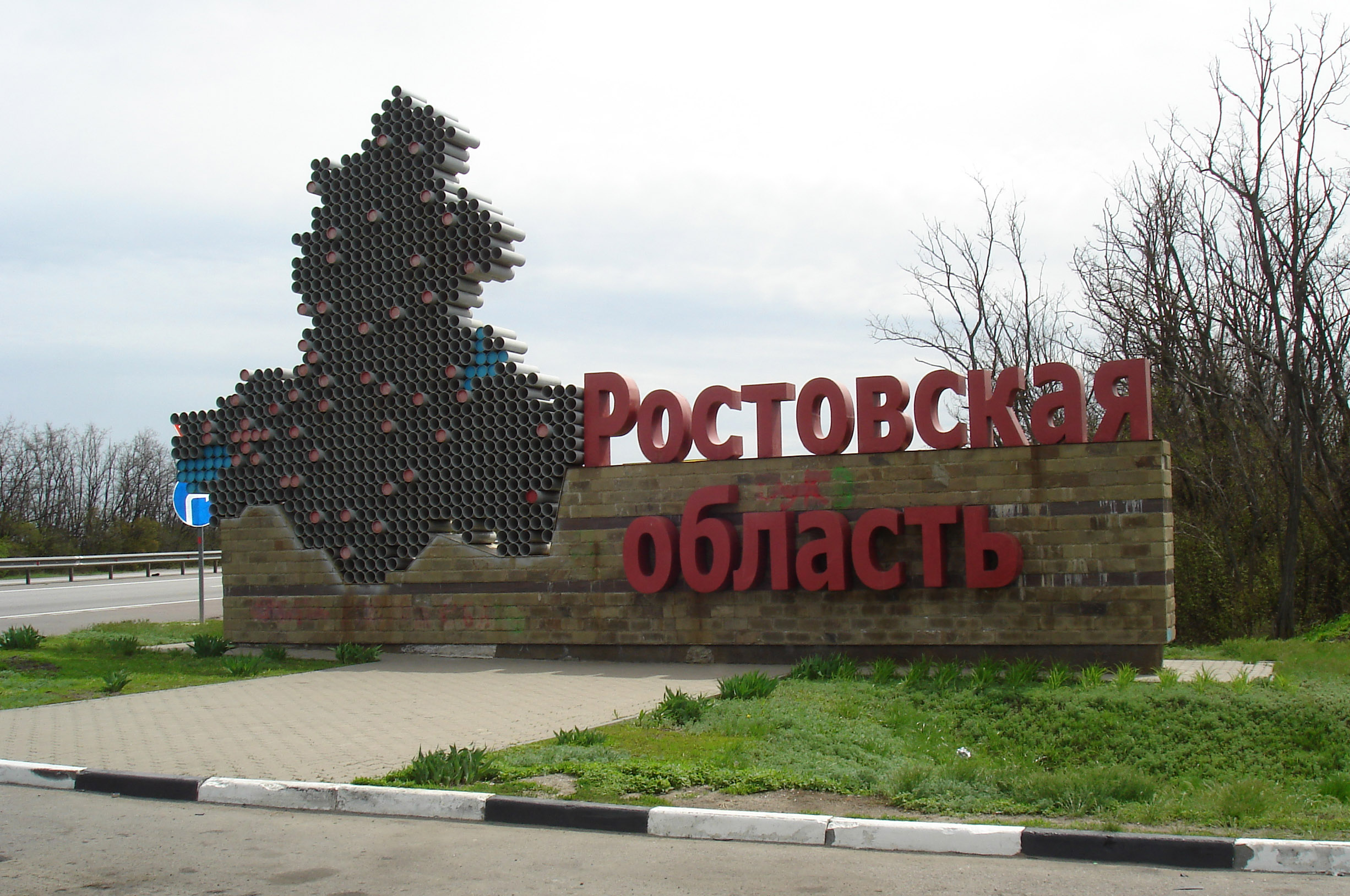 Стела начала Ростовской области на автодороге М4 при въезде с Воронежской области